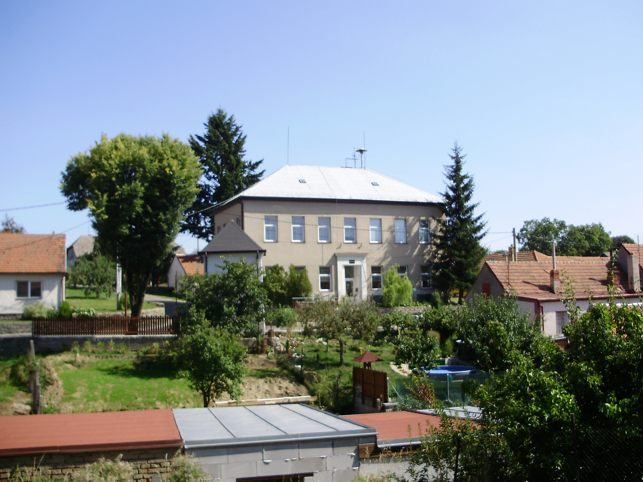 Ježkovice - obecní úřad(Vyškov- Czech republic)